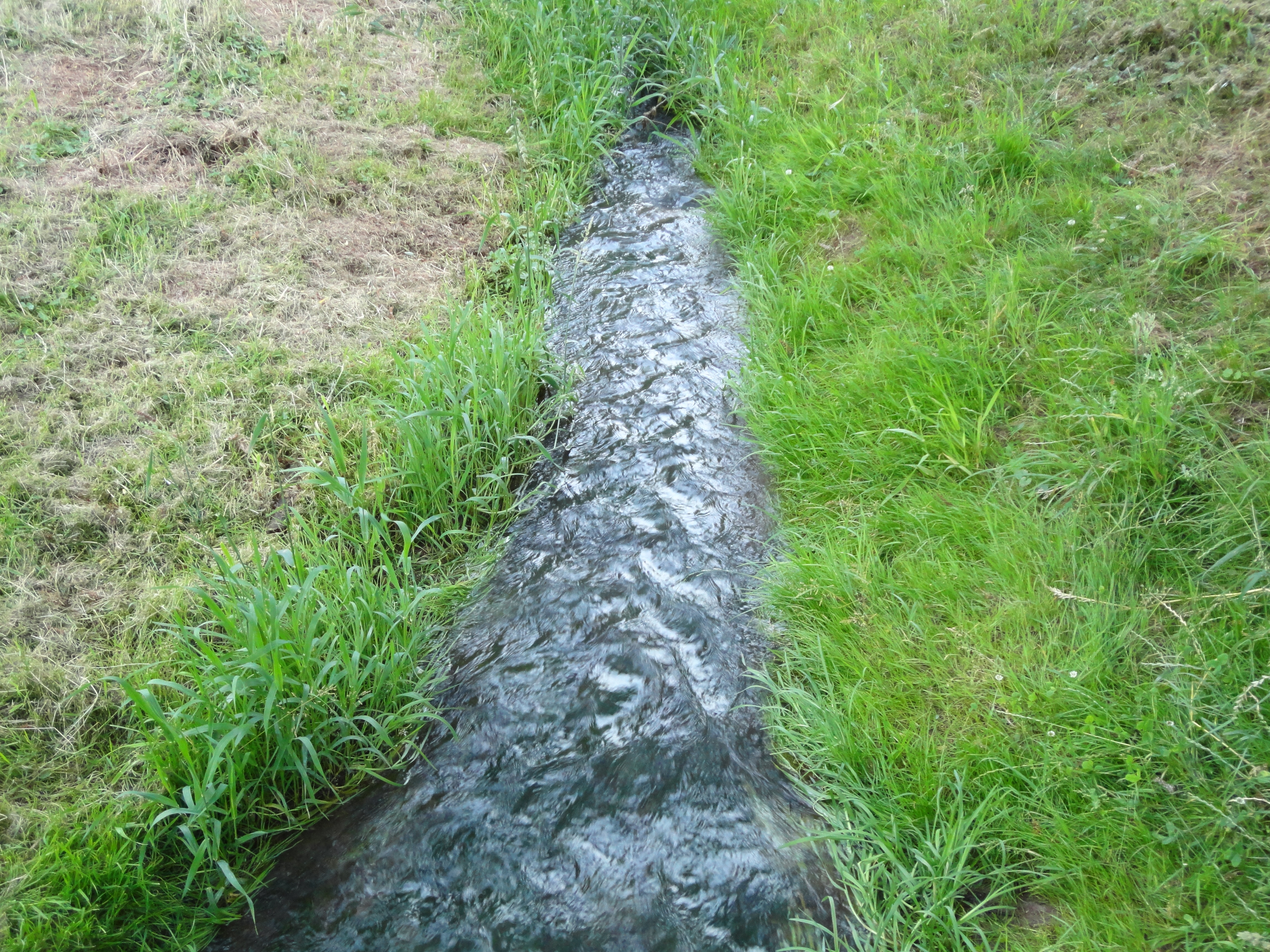 Röstegraben